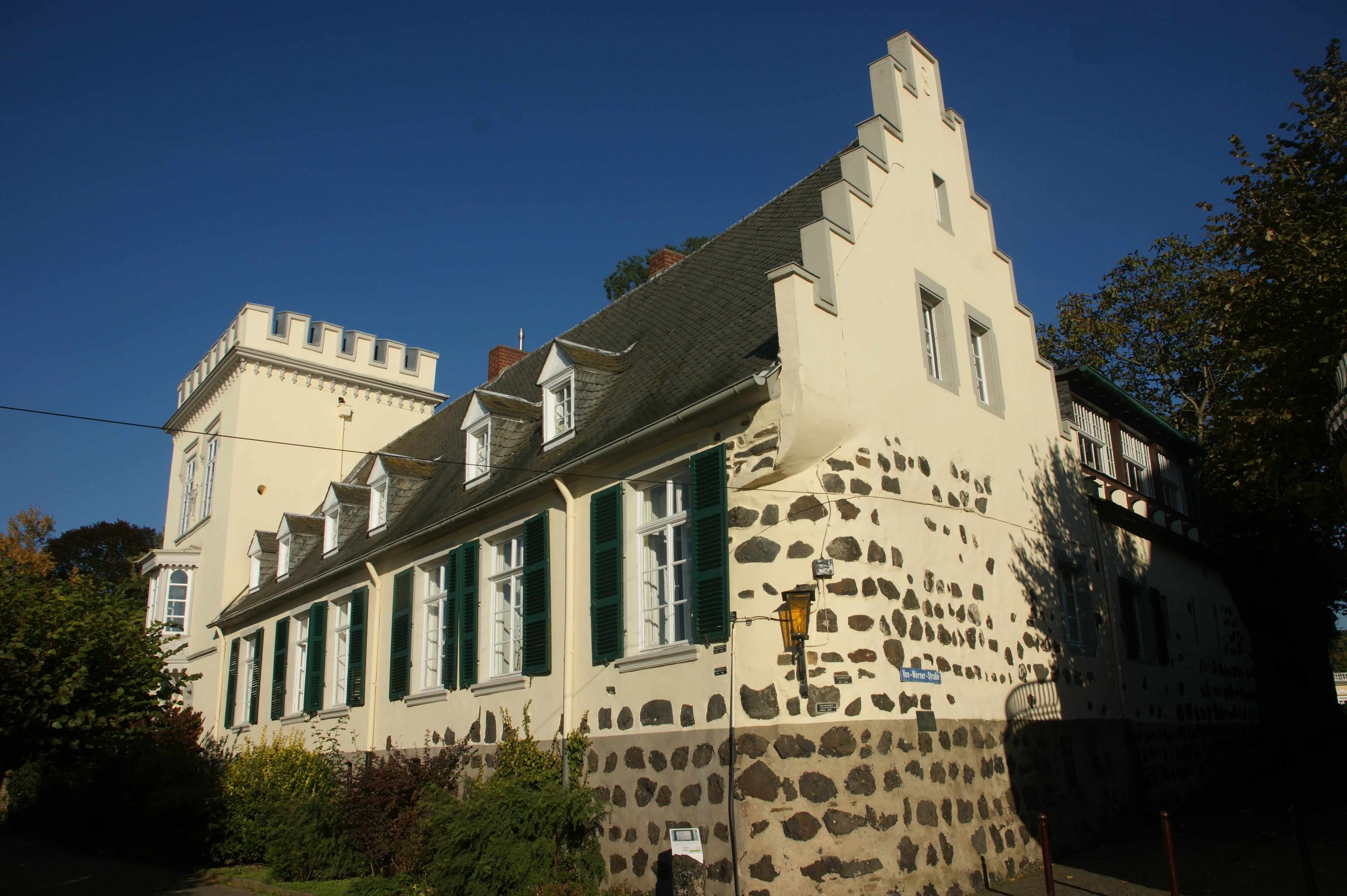 Fronhof in Unkel